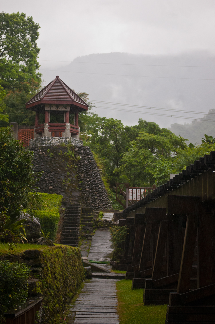 原建於1954年，1993年被寶莉颱風侵襲，1997年重建